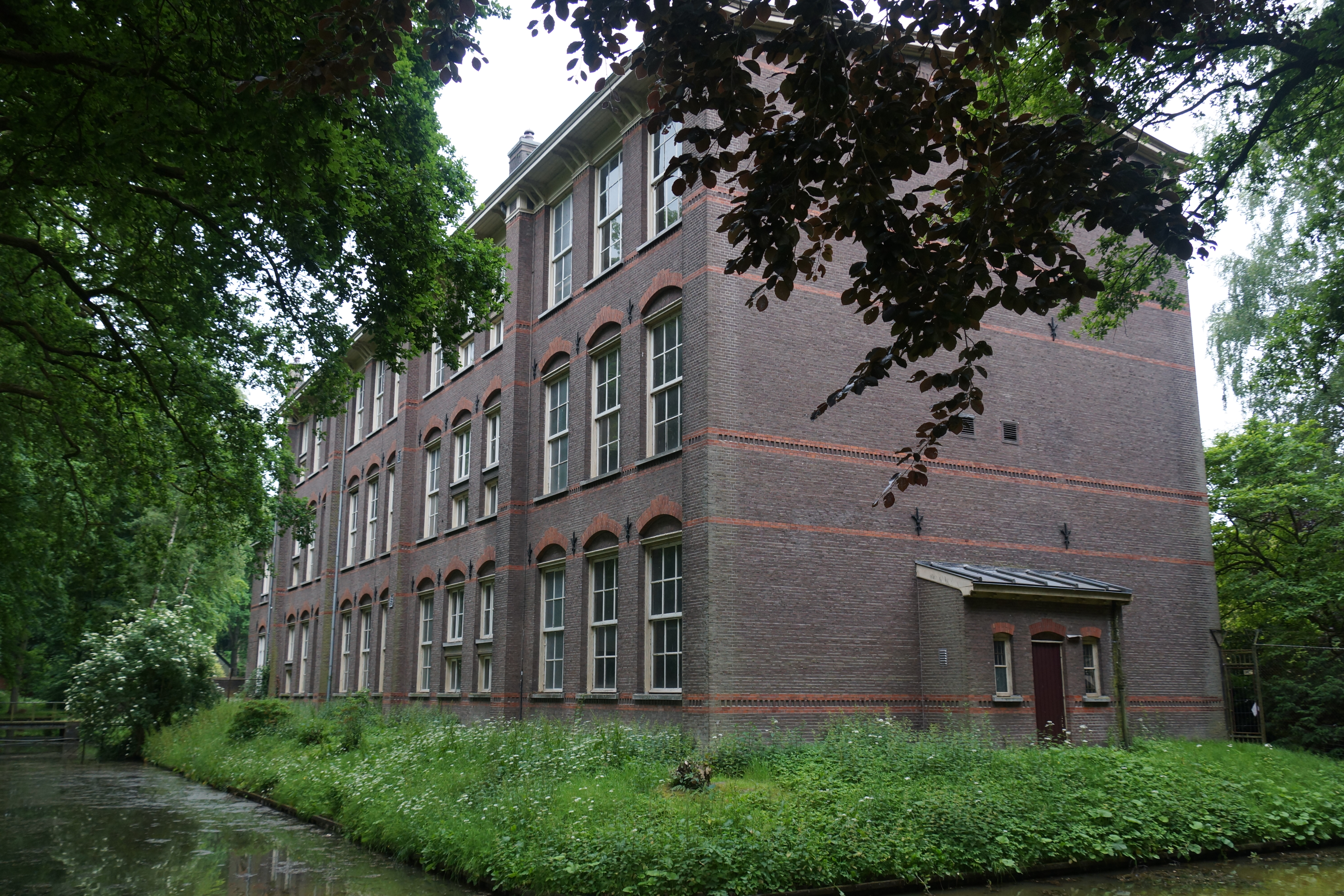 Kruisberg Doetinchem verblijfsgebouw 'De flat' uit 1899 150614 (10)